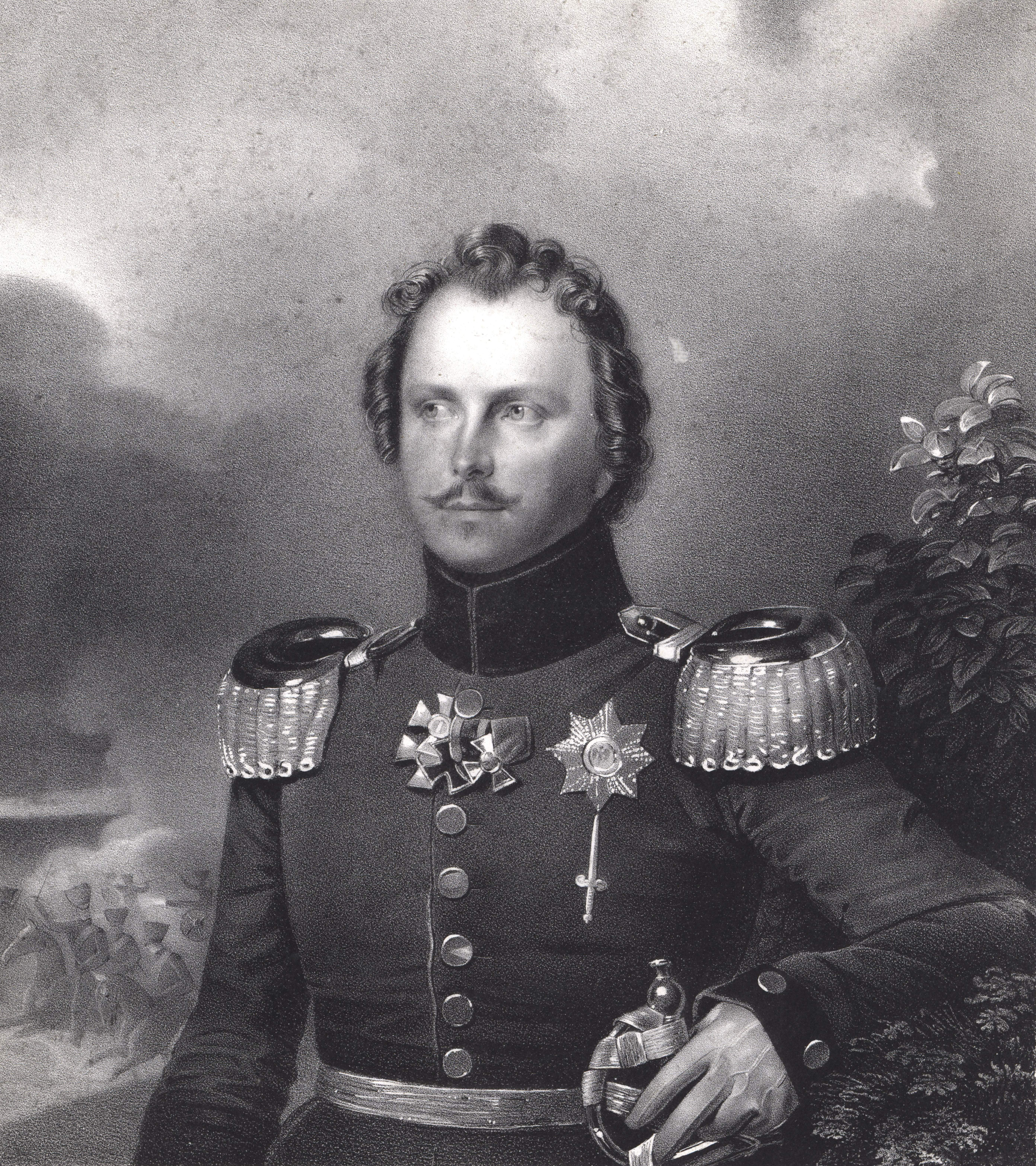 Portrait des Prinzen Friedrich Wilhelm Karl von Preußen (1783-1851)